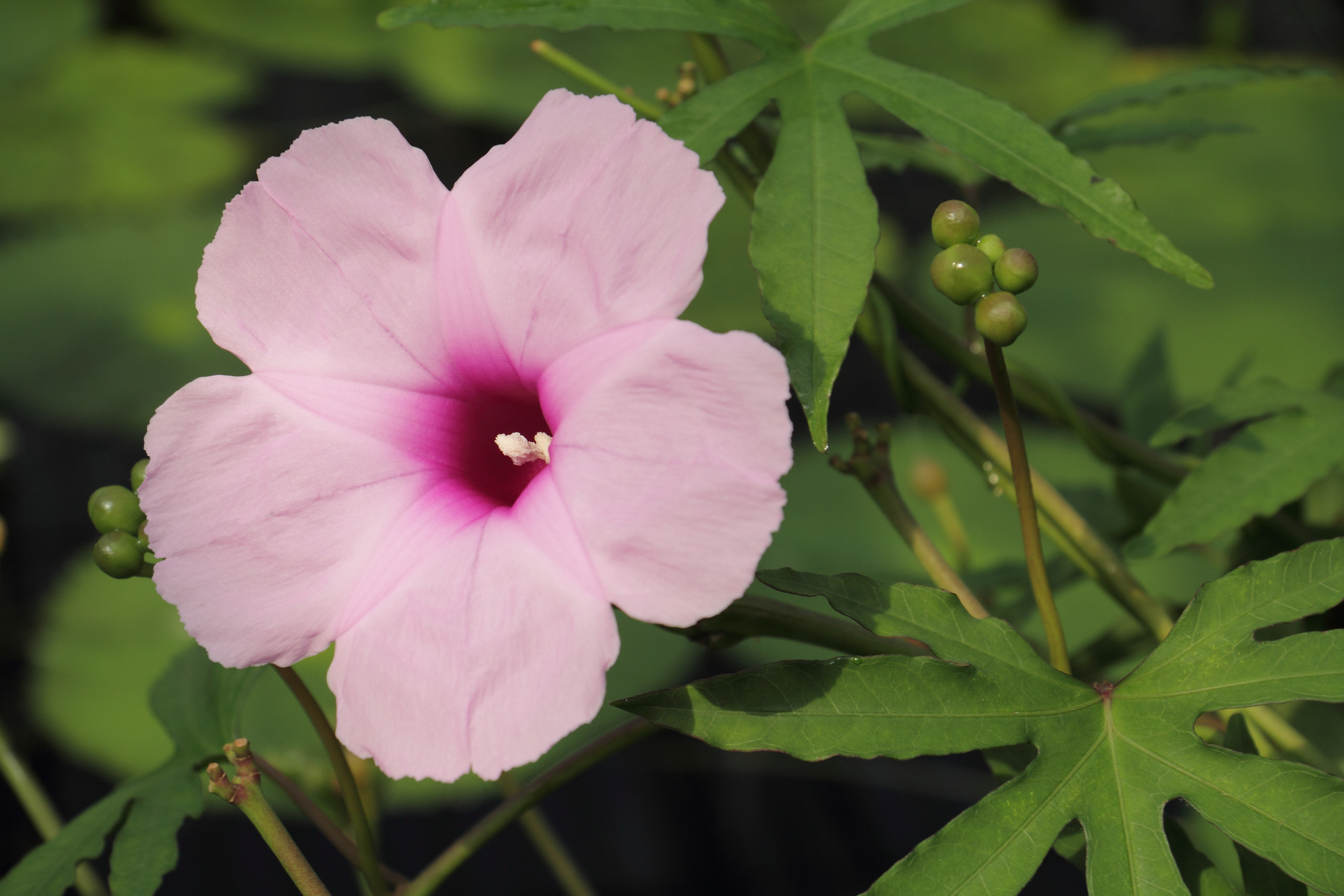 Ipomoea mauritiana, identifierad med hjälp av befintlig skylt vid Kew Gardens, London.